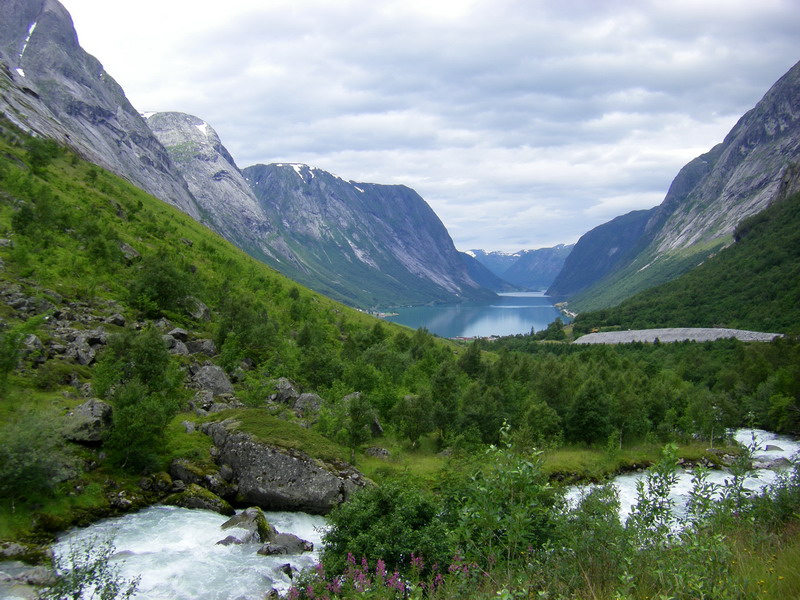 Blick auf Skei